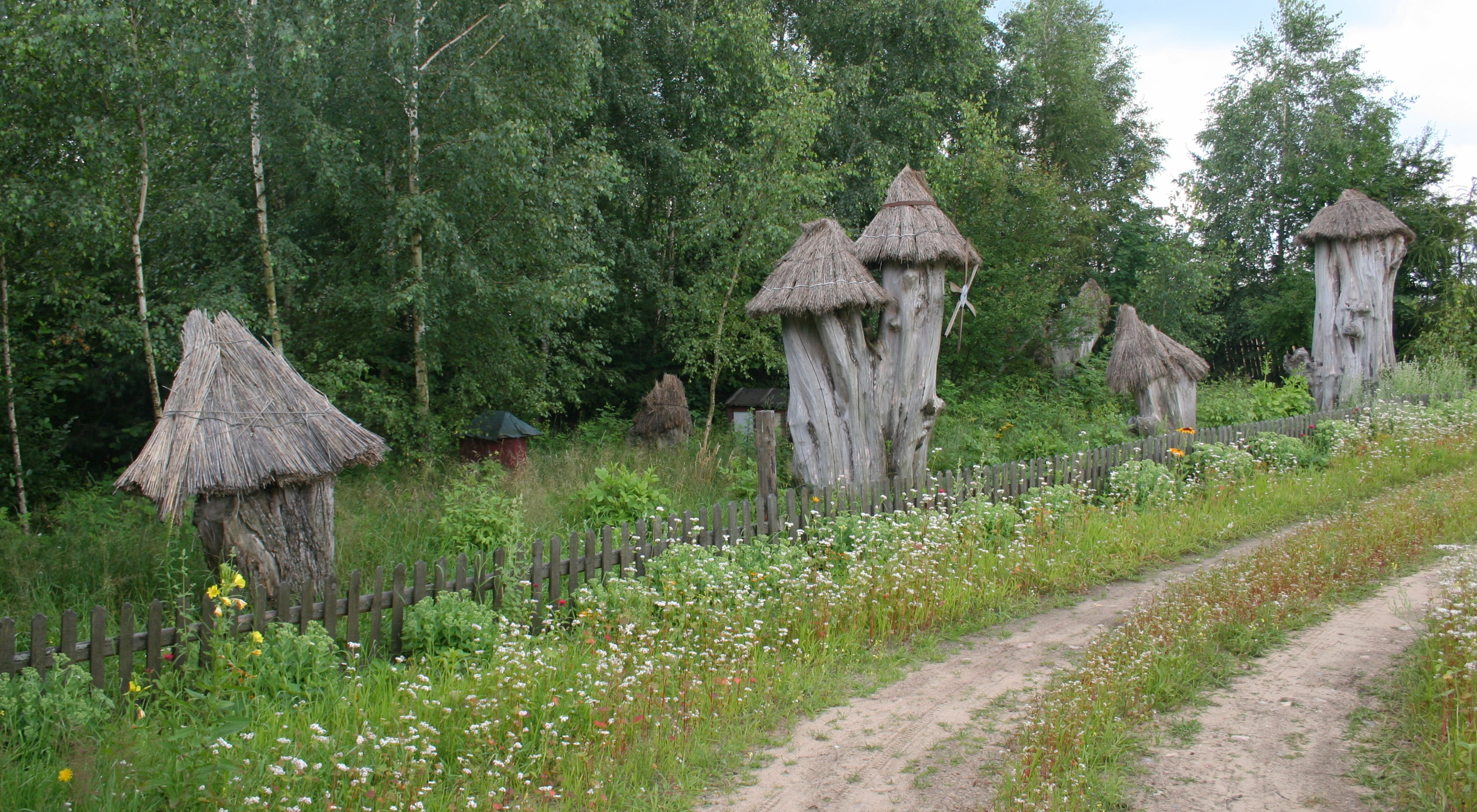 Pasieka przed miejscowością Kleszczele (od strony Hajnówki), woj. podlaskie